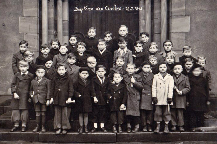 Carling (Moselle), 16 février 1949, baptême des nouvelles cloches et les enfants du village devant l'église catholique Saint-Gérard de Majella.